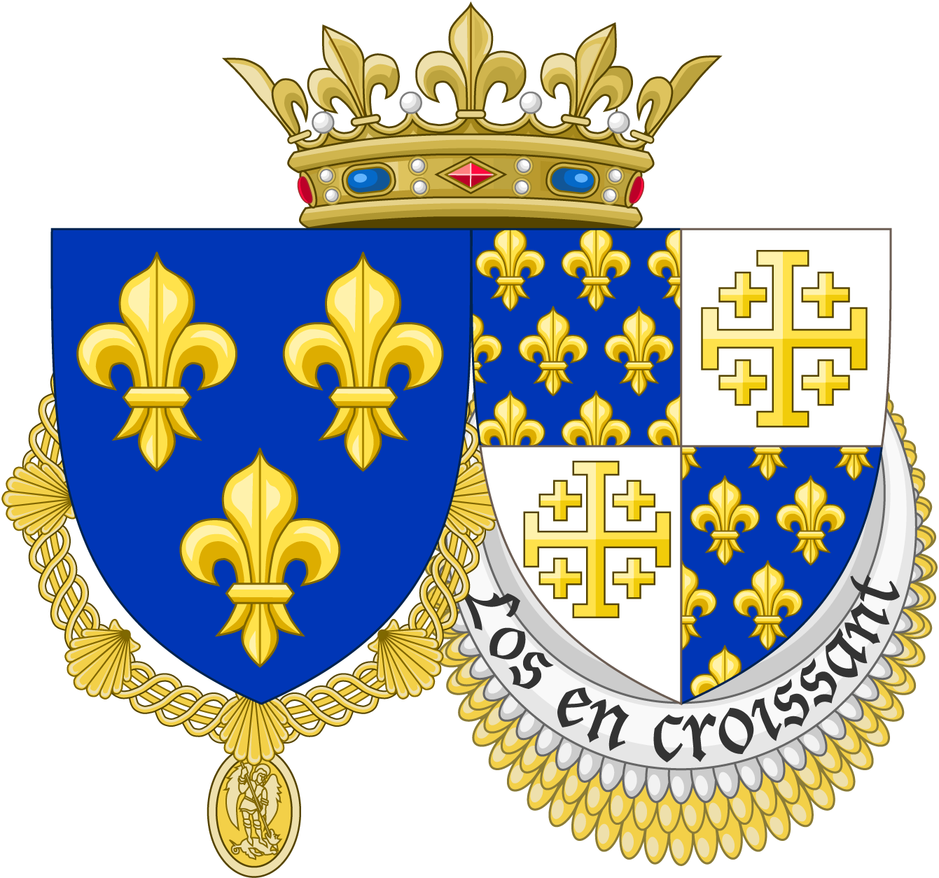 Armes de Charles VIII, roi de France, de Naples et de Jérusalem